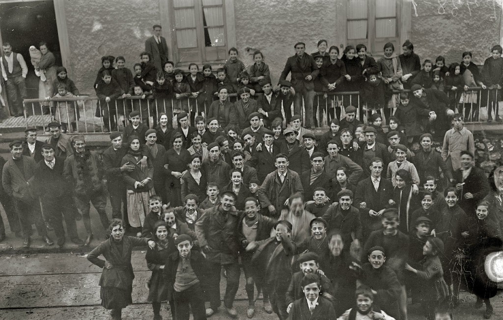 Título original: Actuación de la tamborrada Donosti Zarra por el barrio del Antiguo (11/13) Localización: San Sebastián (Guipúzcoa)